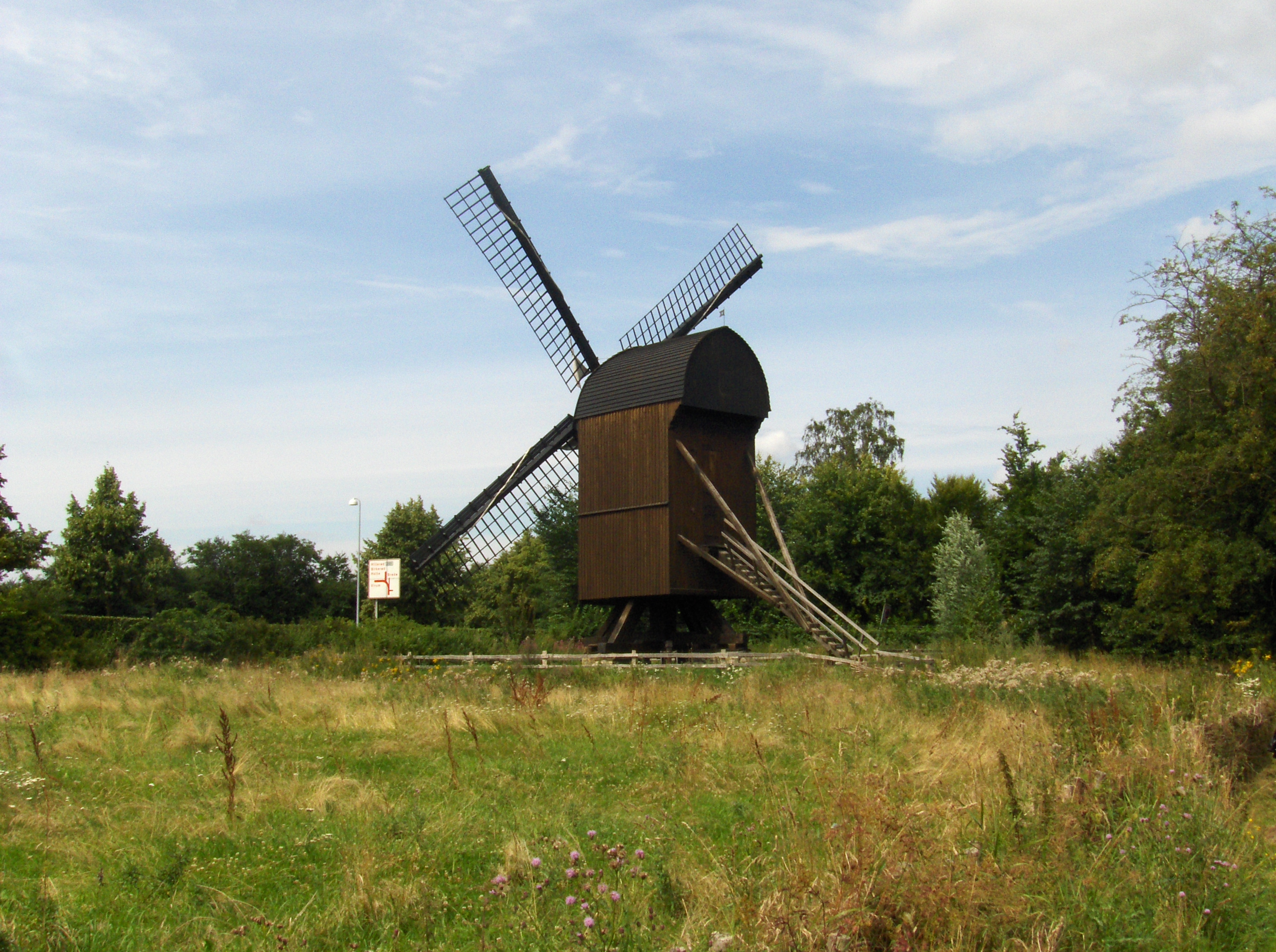 Stubmølle på Frilandsmuseet.